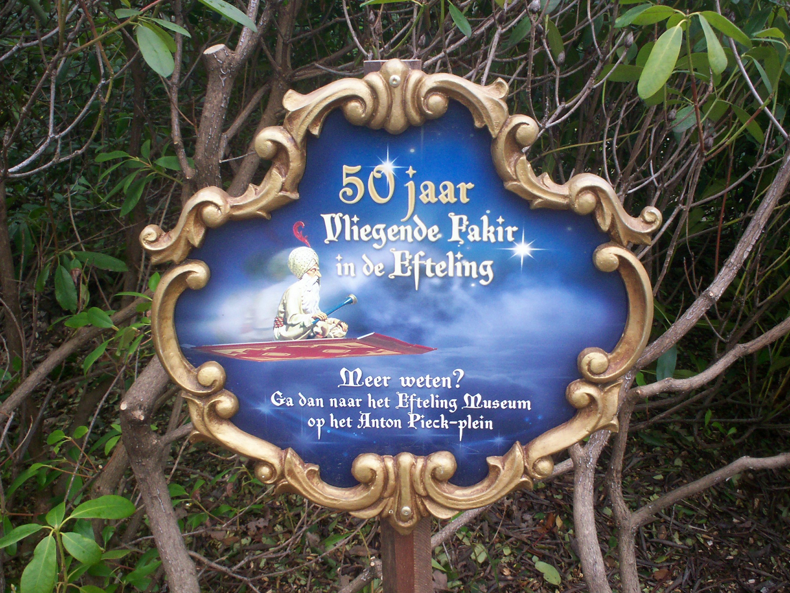 Bordje 50jarig jubileum fakir.